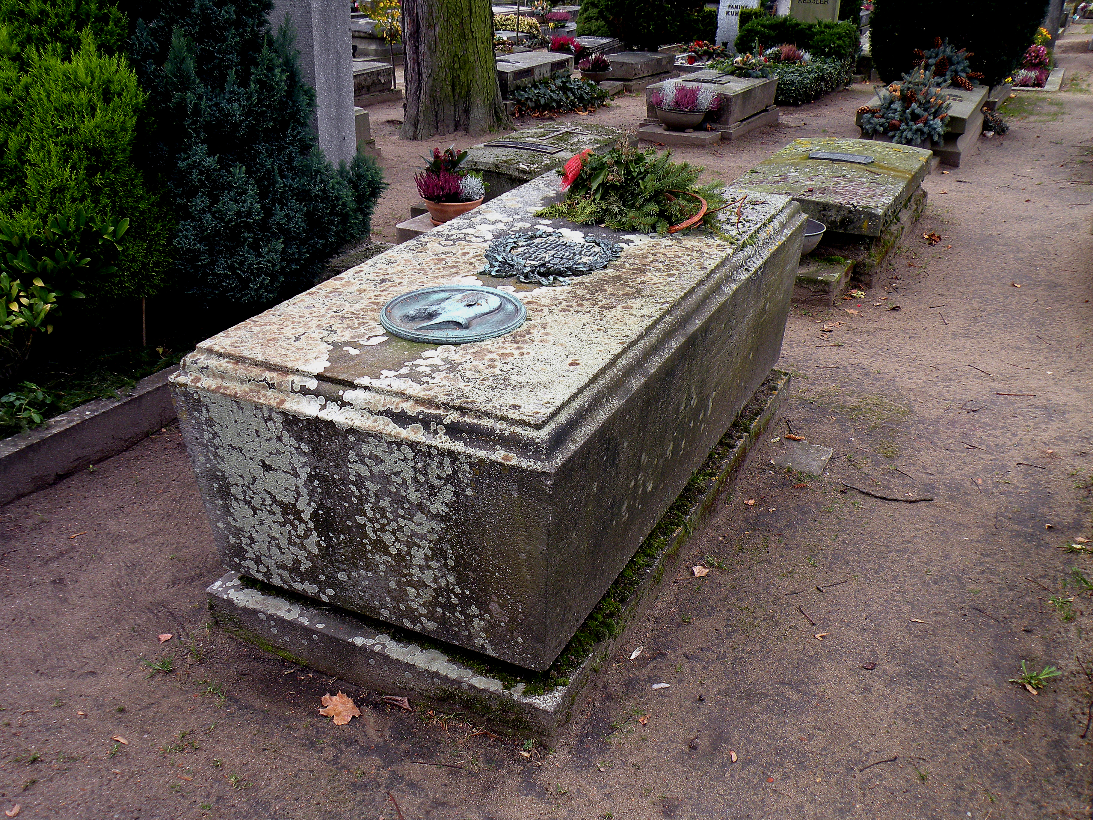 Grab Ludwig Feuerbachs auf dem Nürnberger Johannisfriedhof